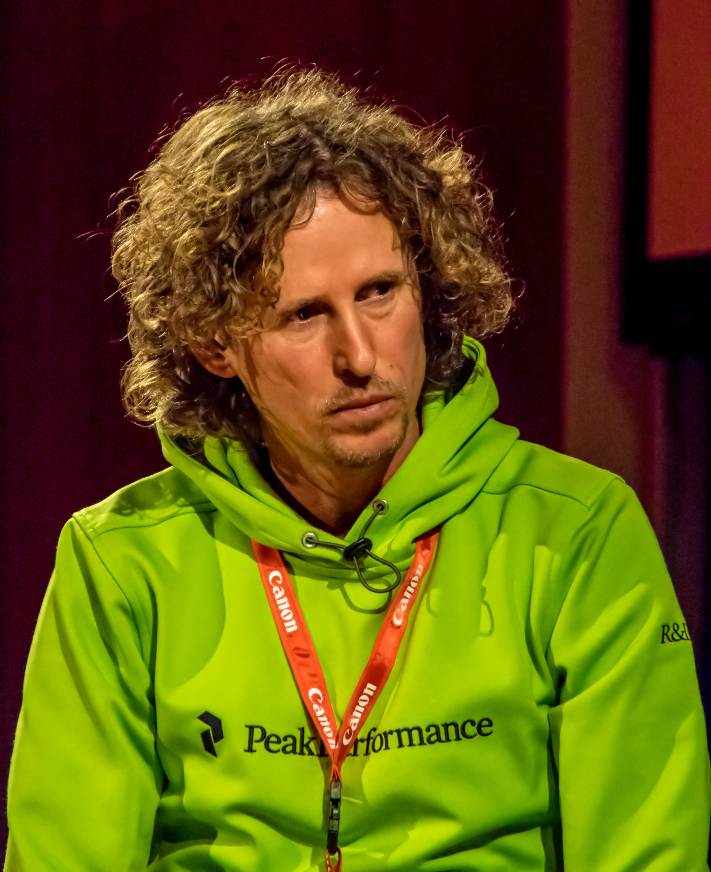 Bilder von der Mundologia 2015 Tobias Hauser